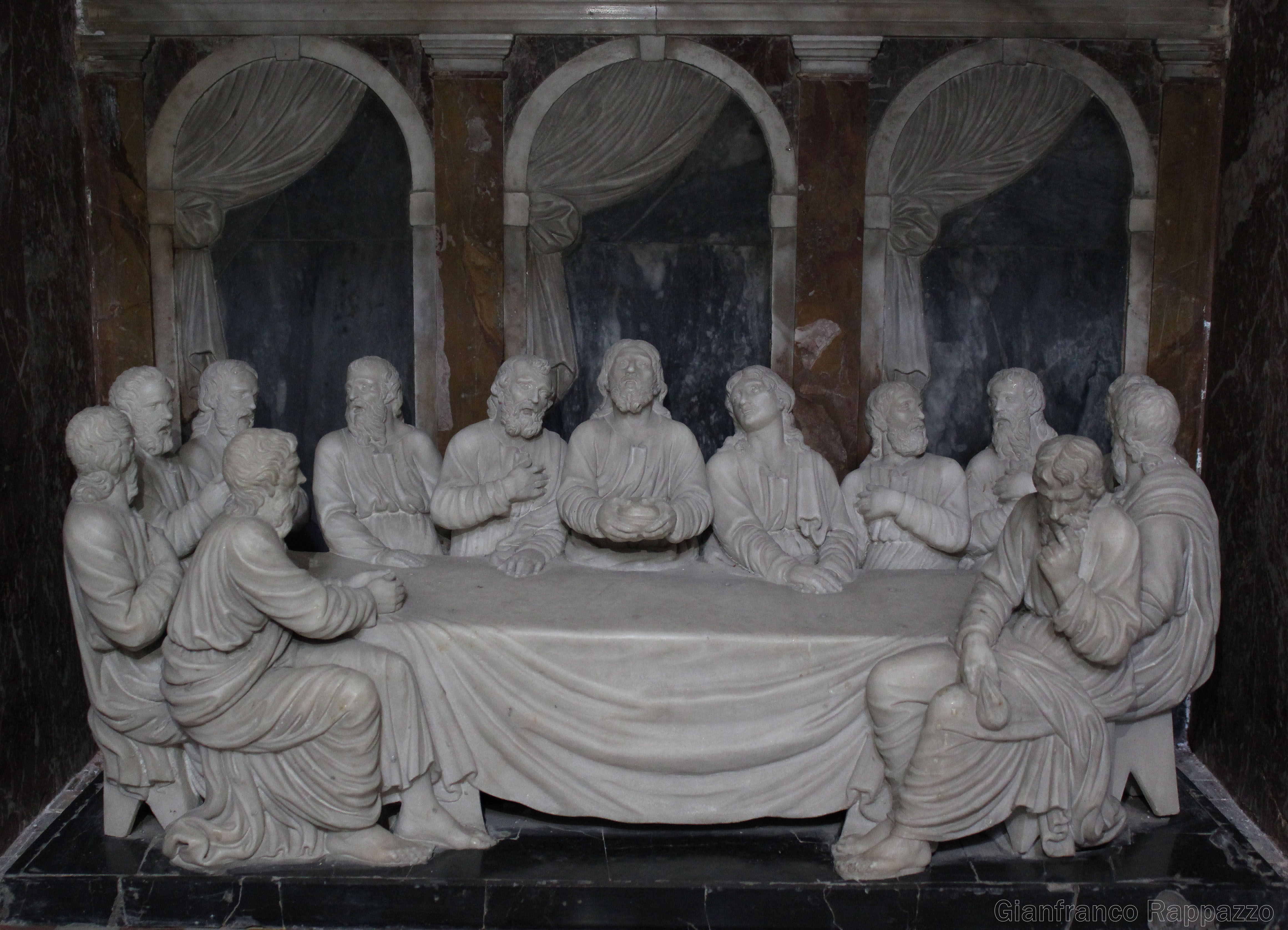 Scultura Ultima Cena, Valerio Villareale, Basilica Cattedrale, Santa Lucia del Mela